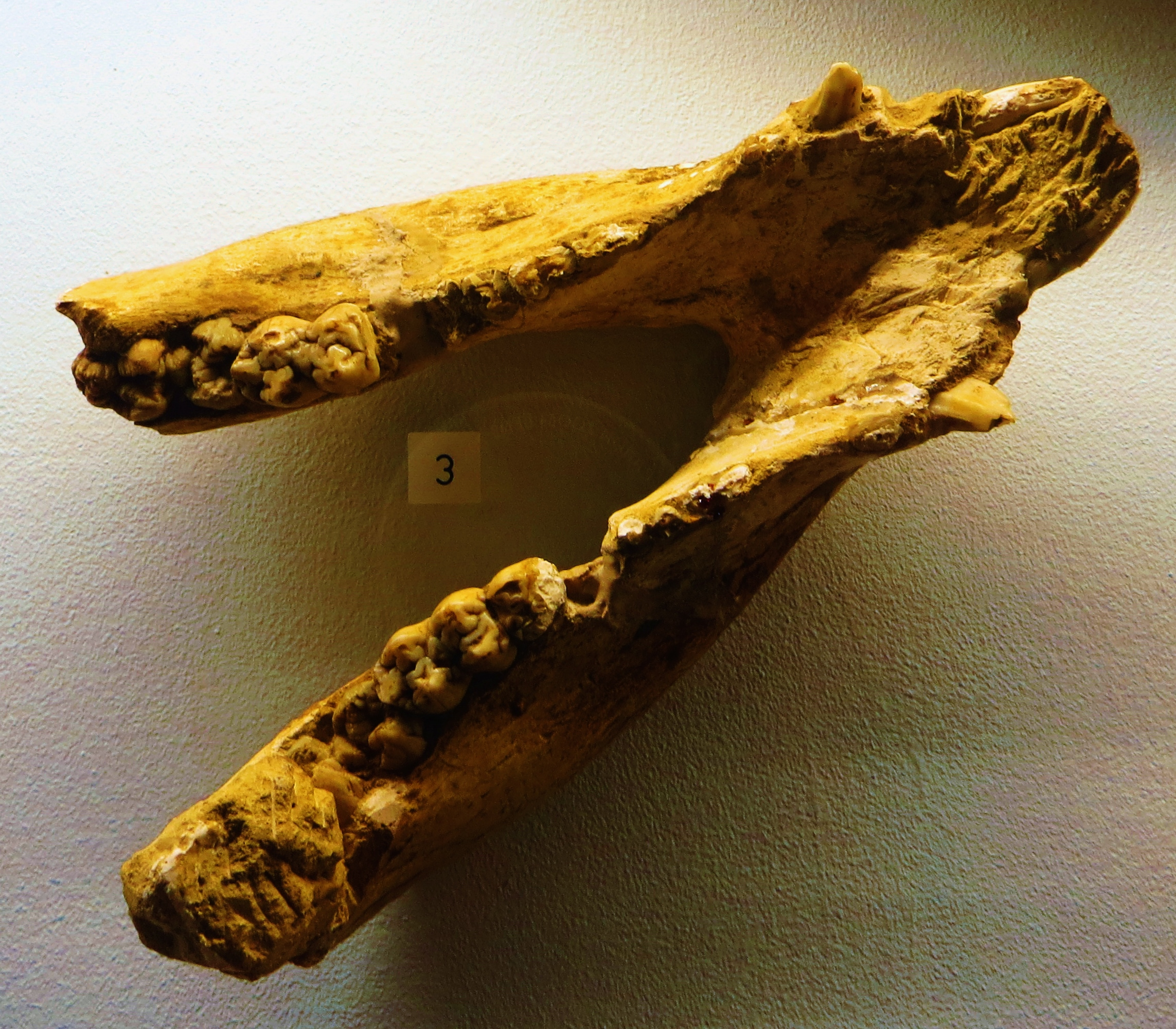 Fossil of Sus strozzii, an extinct mammal - Took the picture at Museum of Paleontology of Tuebingen